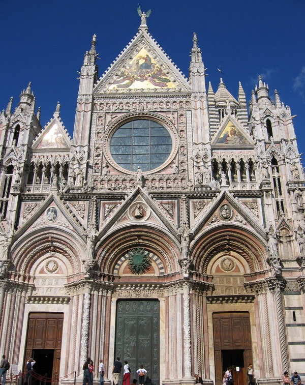 Duomo in Siena